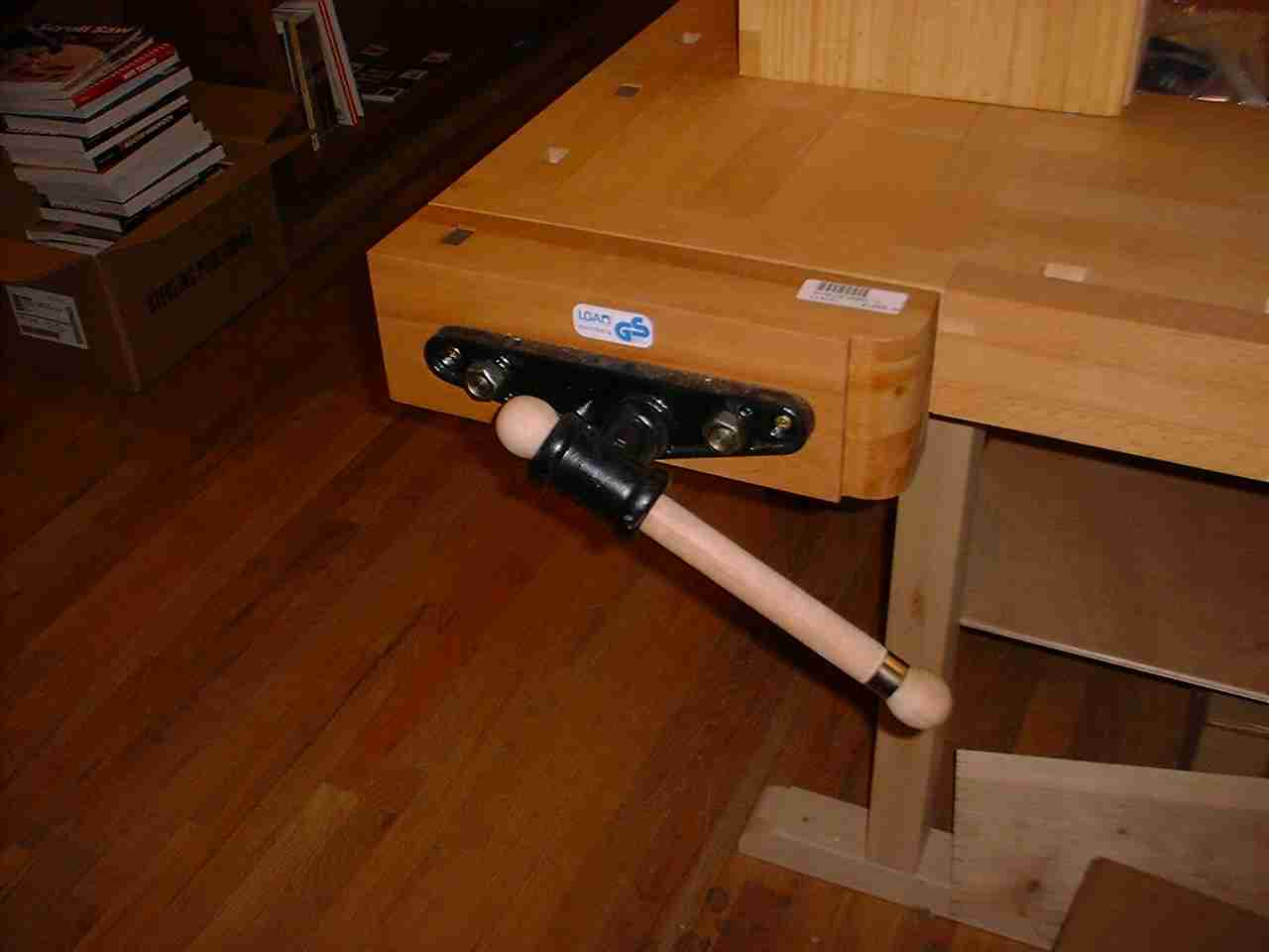 A hybrid vise